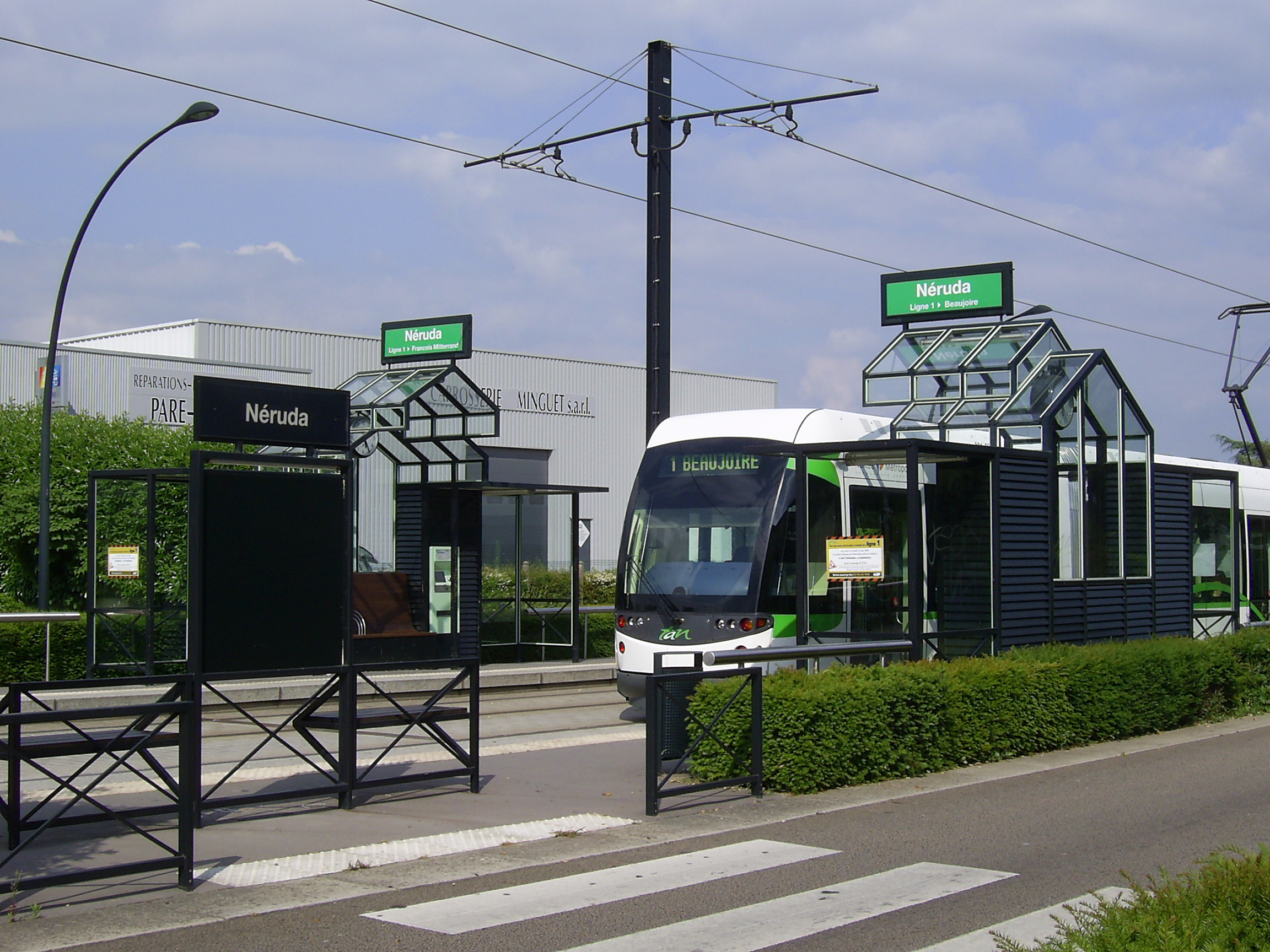 La station "Neruda" de la ligne 1 du tramway nantais, à Saint-Herblain